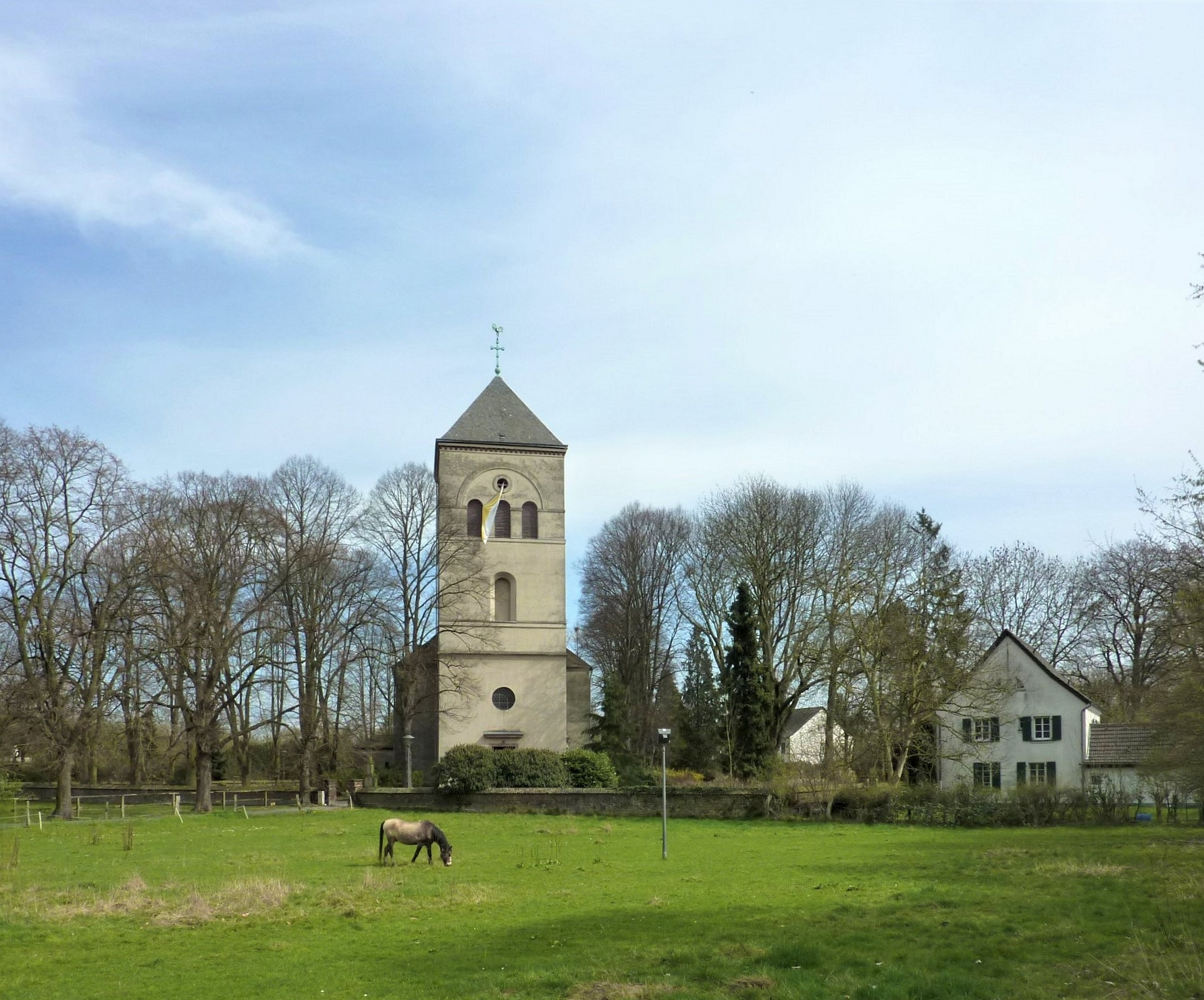 St. Gereon, Köln-MerheimMerheim